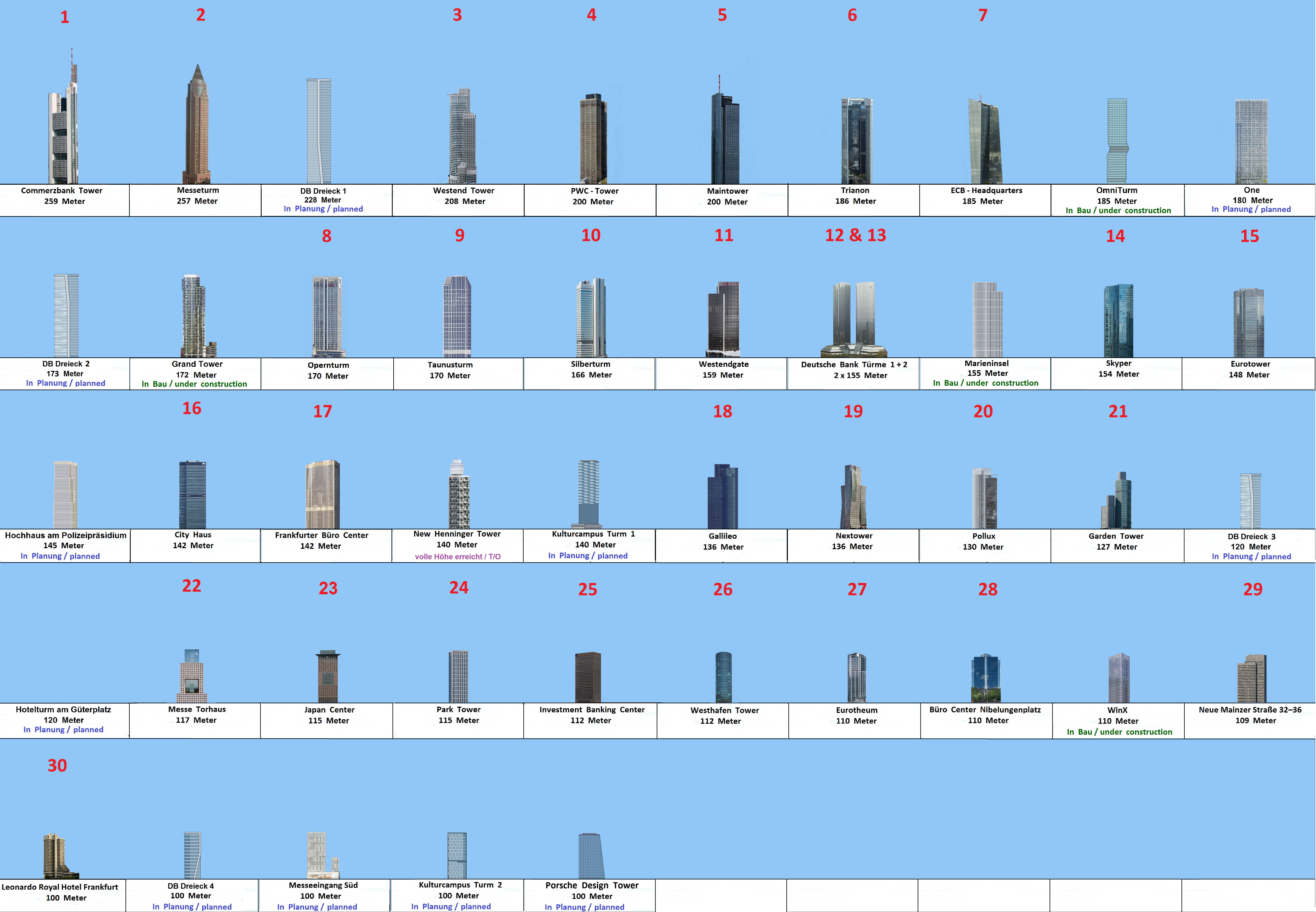 Diagramm aller Hochhäuser in Frankfurt ab 100 Meter.(fertiggestellt, in Bau, in Planung)